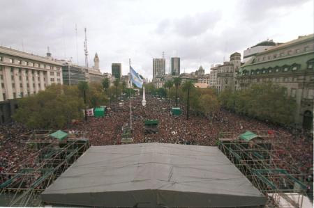 Celebración del día de la revolución de mayo en la Plaza de Mayo, Buenos Aires